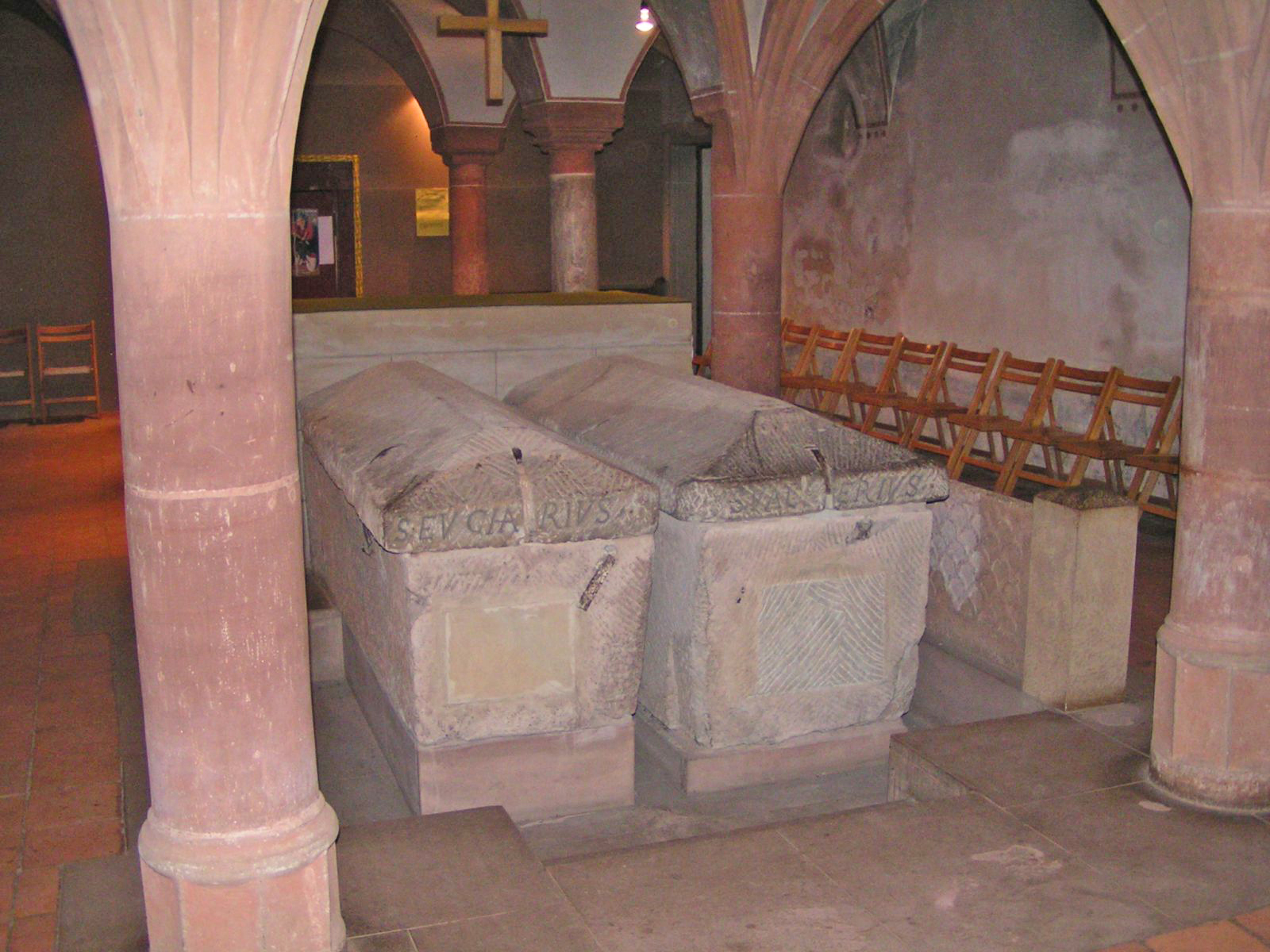 Bëscheefsgriewer.